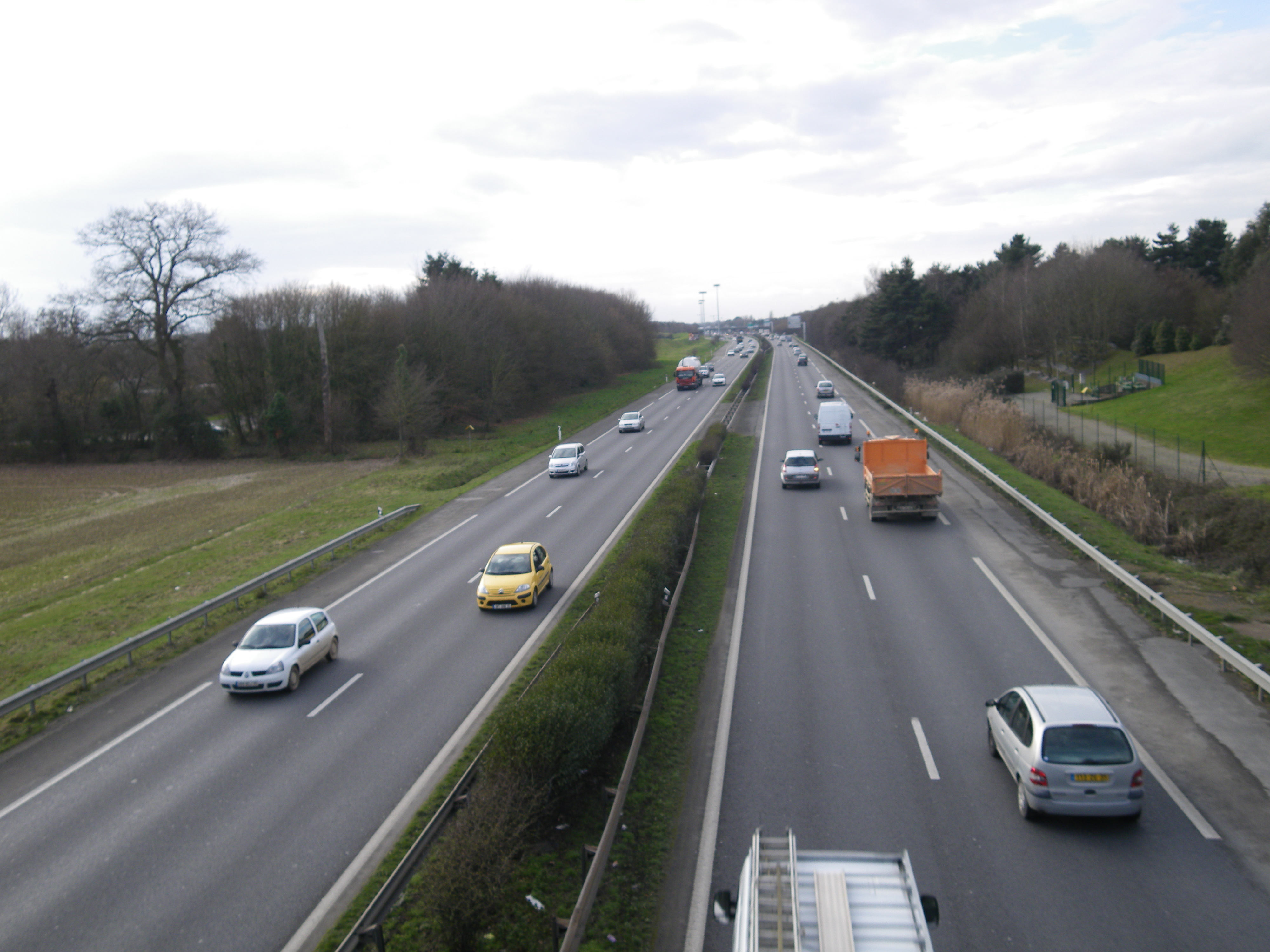 la RN 136 vue de la route de chatillon